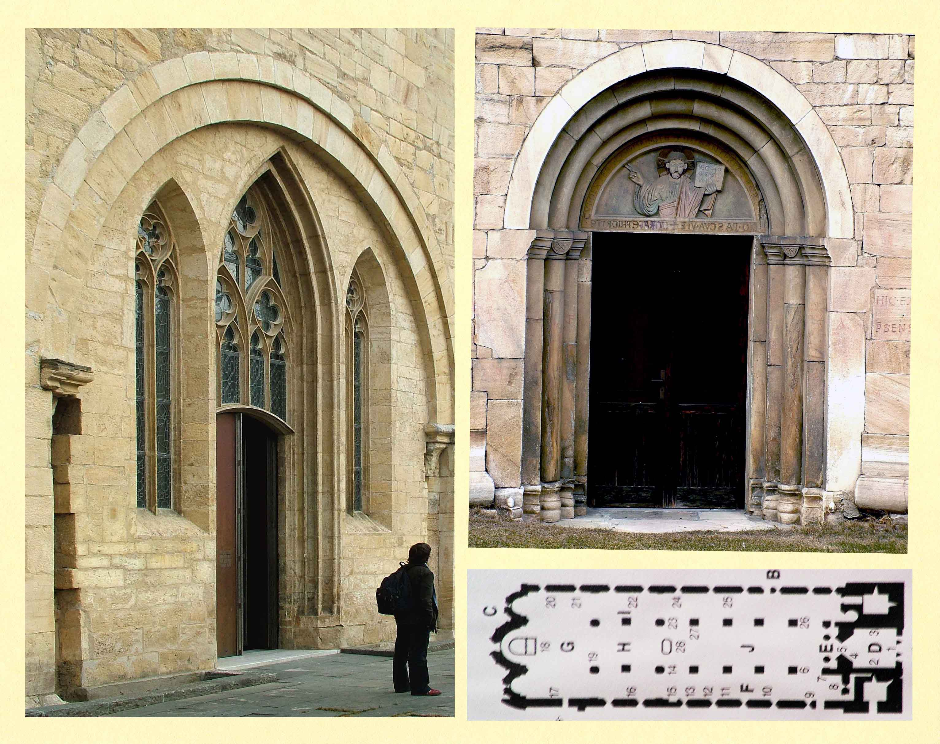 Gurki székesegyház (Ausztria): nyugati és déli kapuk, a templom alaprajza